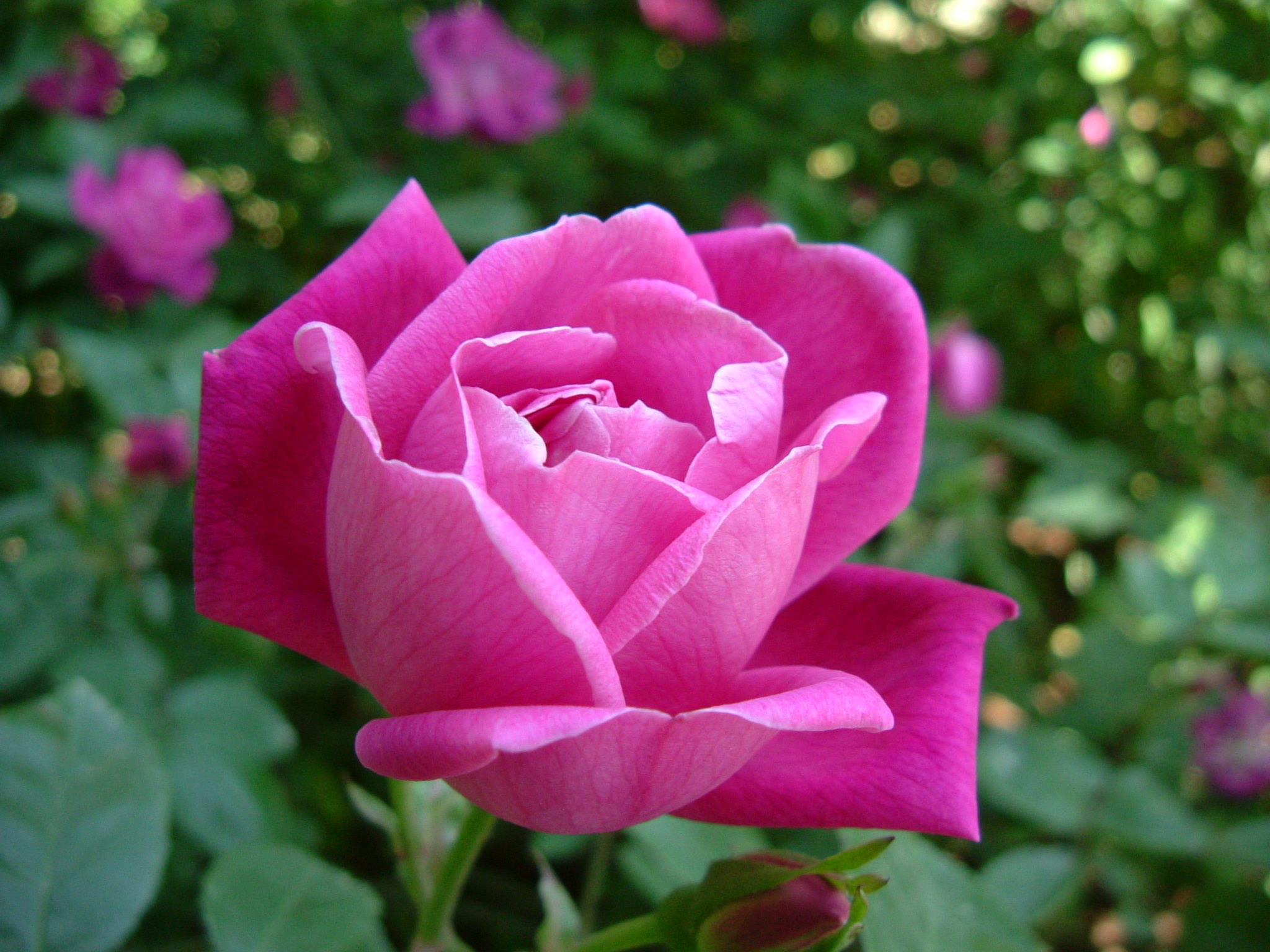 ロサ キネンシス Rosa chinensis